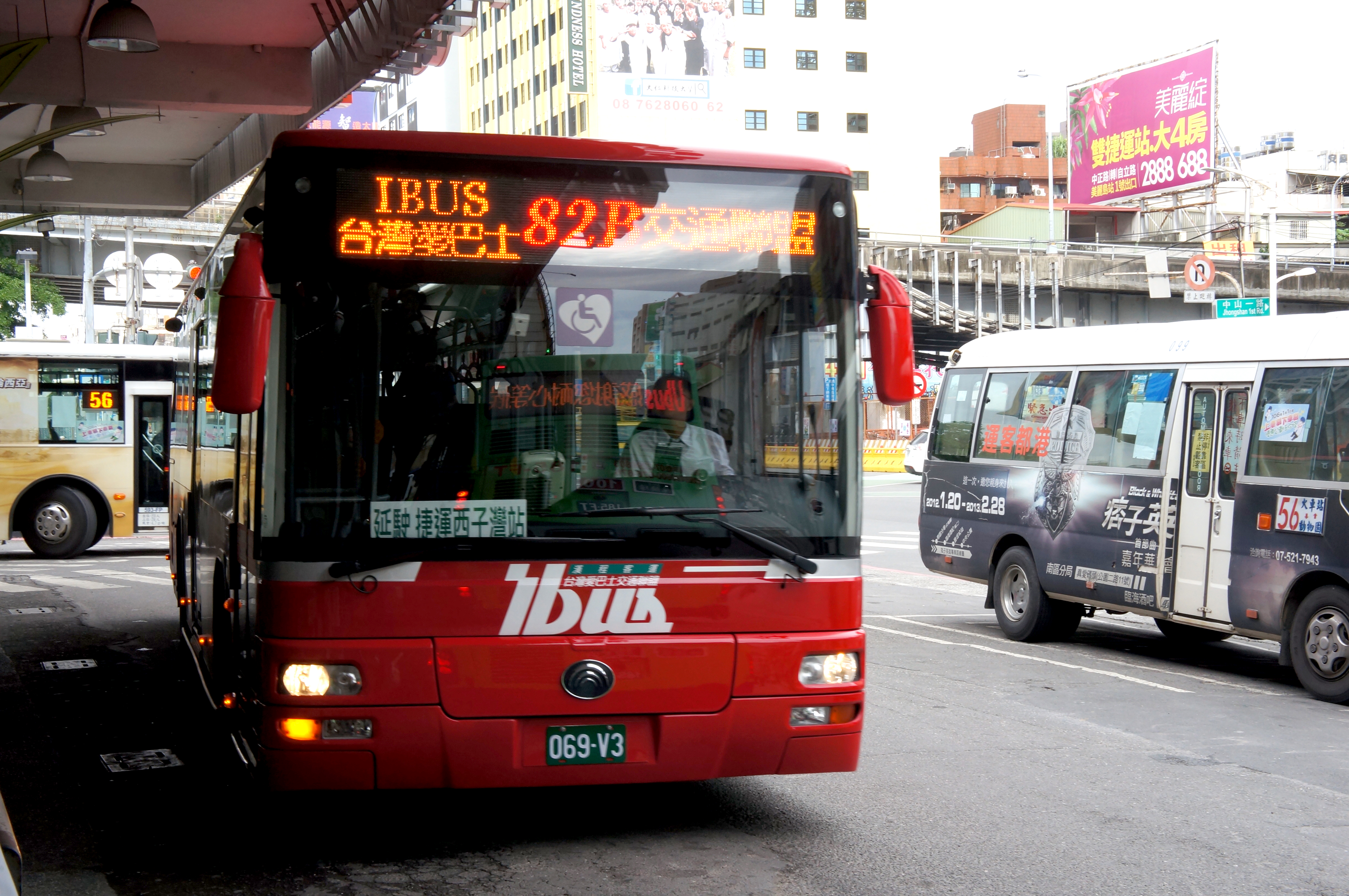 中文（台灣）: 漢程客運宇通大客車069-V3，行駛高雄市公車82路。